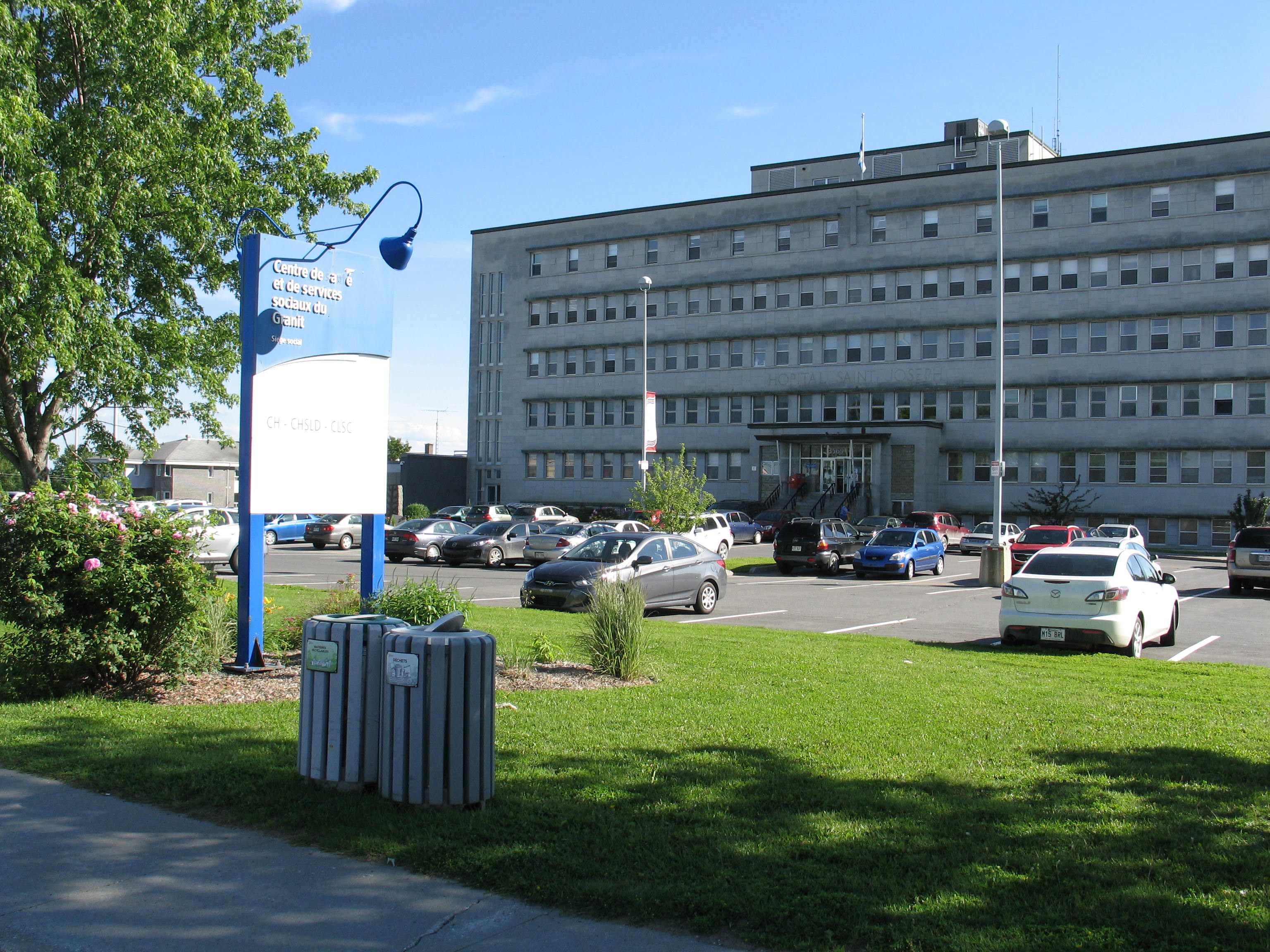 Le Centre de santé et services sociaux du Granit à Lac-Mégantic, Québec, est un établissement de santé public qui regroupe les principales installations sanitaires de la municipalité. Il regroupe un centre hospitalier de 35 lits, un centre hospitalier de soins de longue durée (CHSLD) de 44 lits et un Centre local de services communautaires (CLSC).